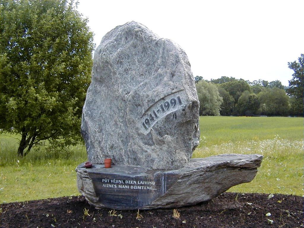 Stalbe, piemineklis represētajiem 2002-06-01